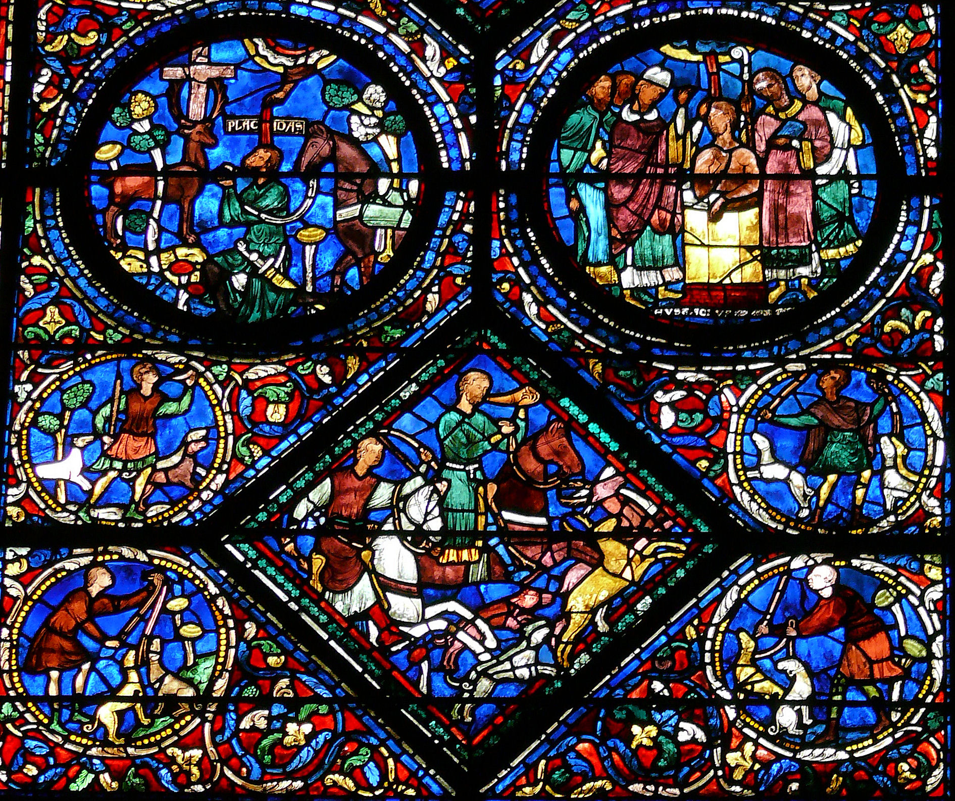 Cathédrale de Chartres - Vitrail de la Vie de saint Eustache